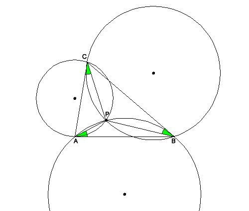 Public Domain, selbst erstellt